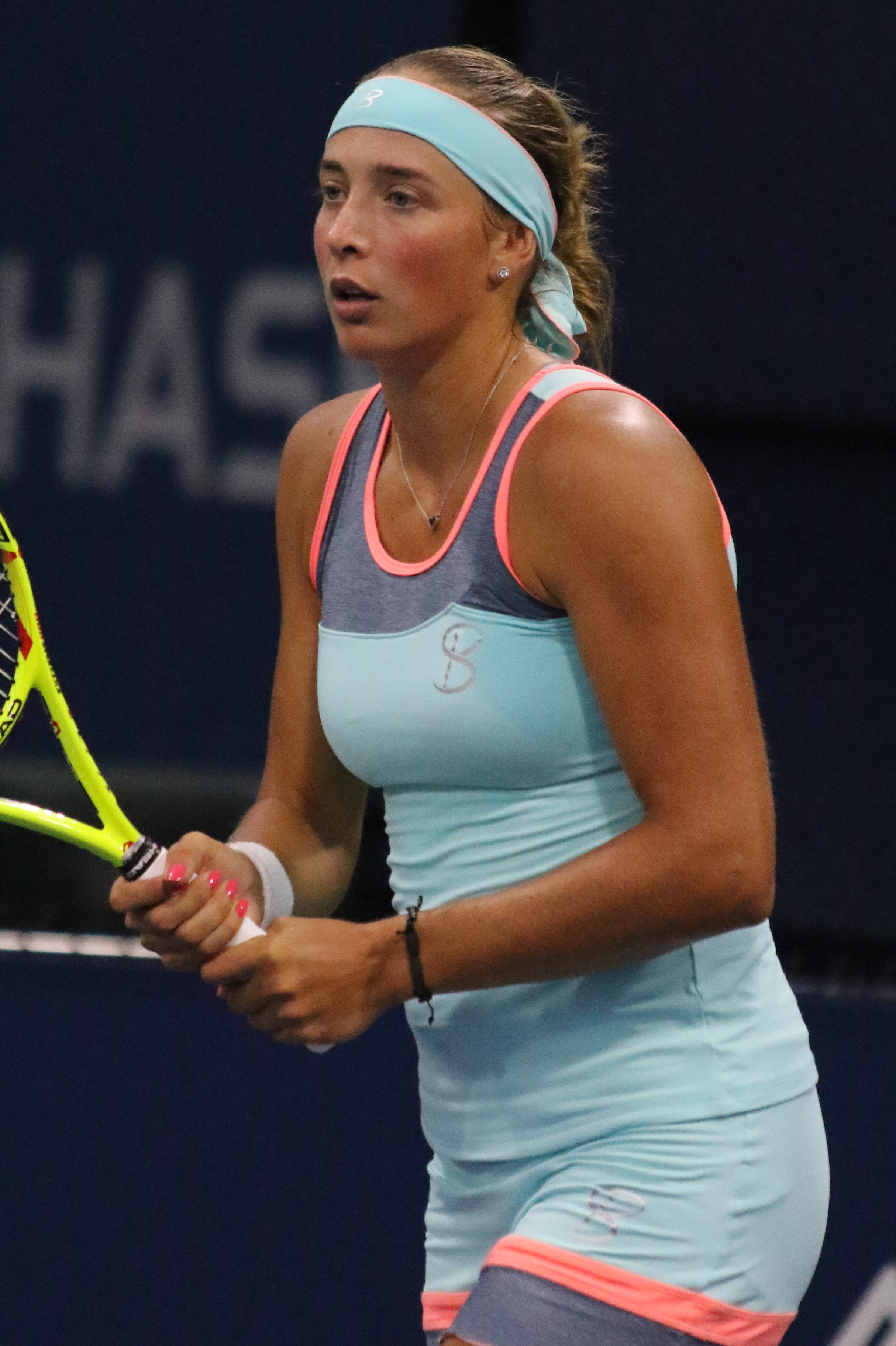 Kalashnikova US16 (11)